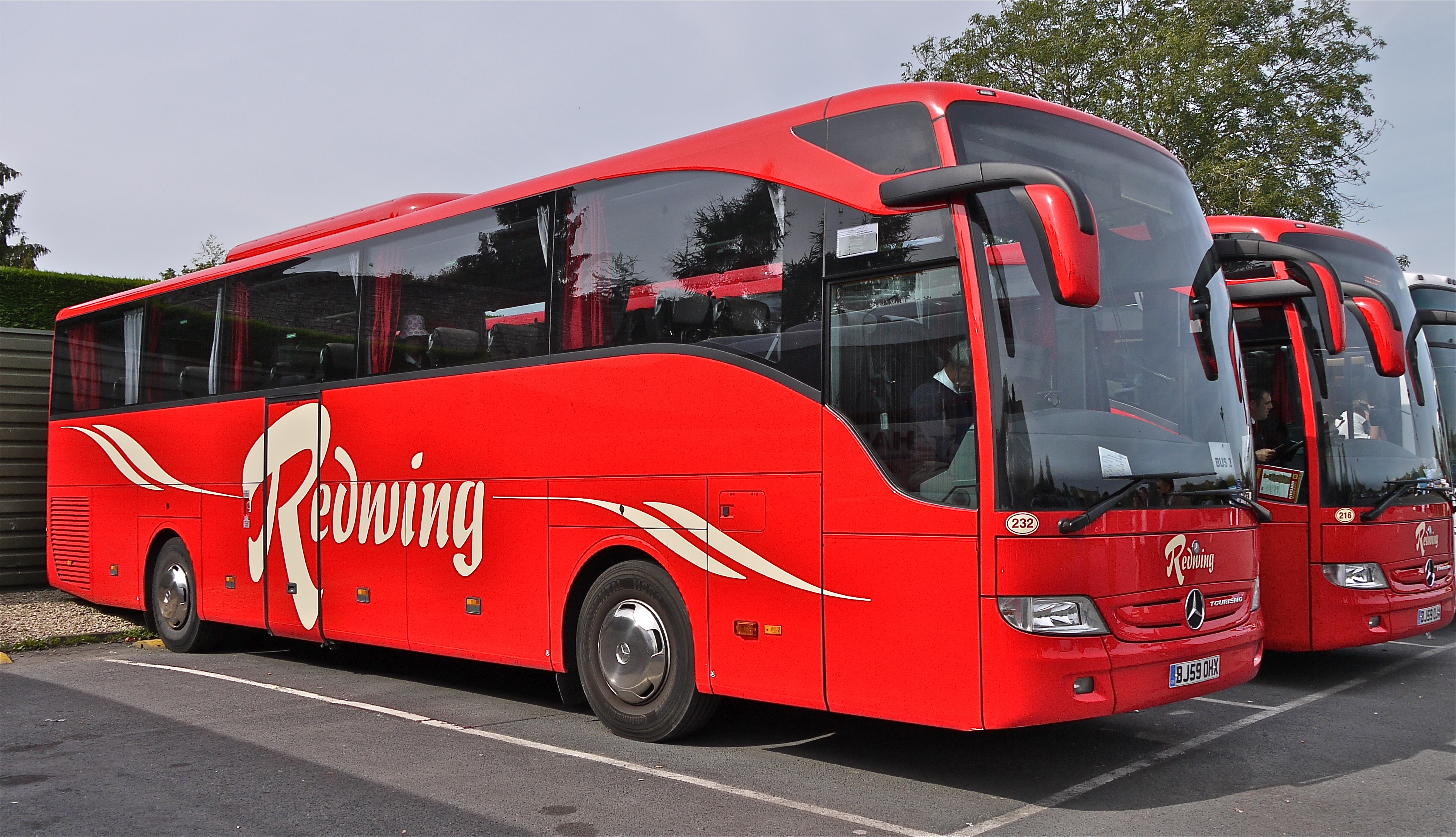 Panasonic G1 14-45 Lens